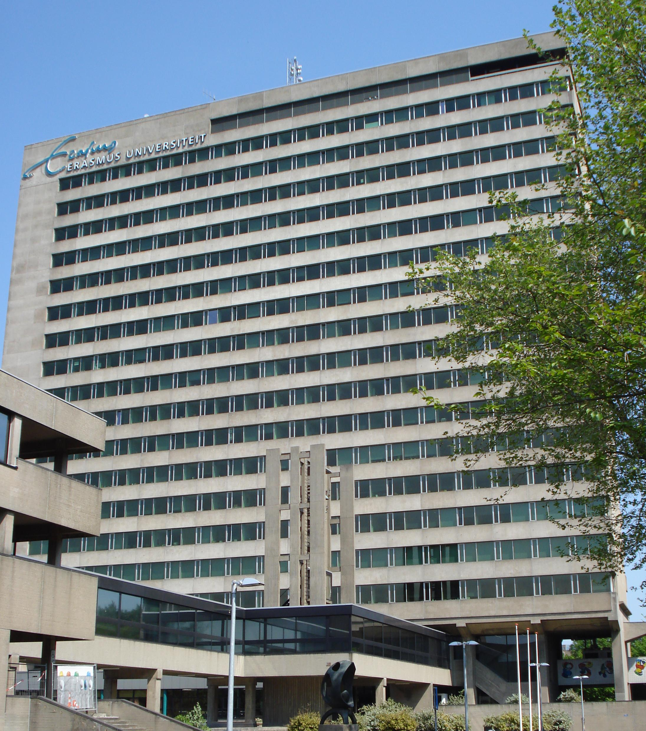 Rotterdam. Erasmus universiteit: faculteitsgebouw. Gemeentemonument.